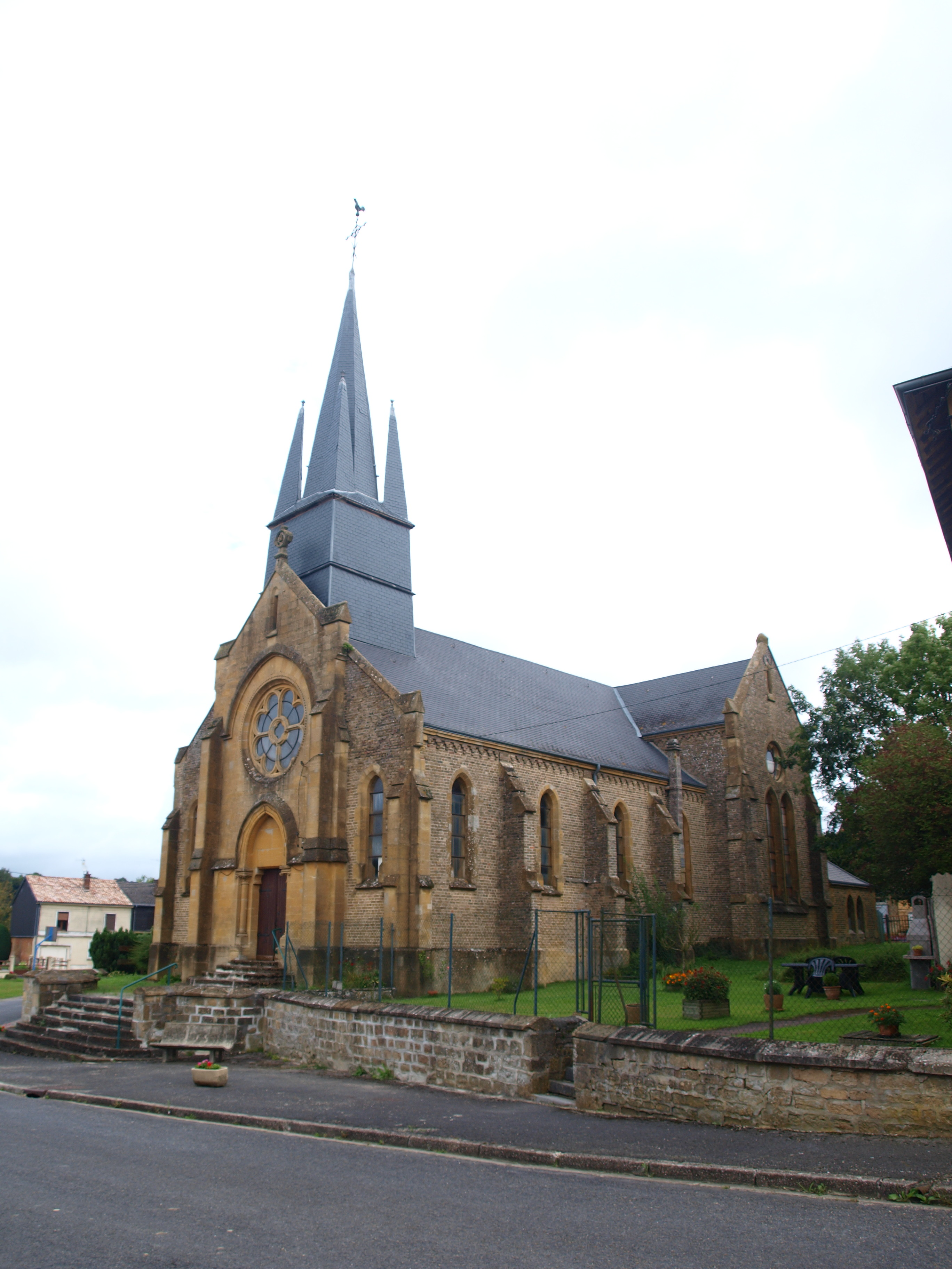 La Croix-aux-Bois (Ardennes, France) ; église